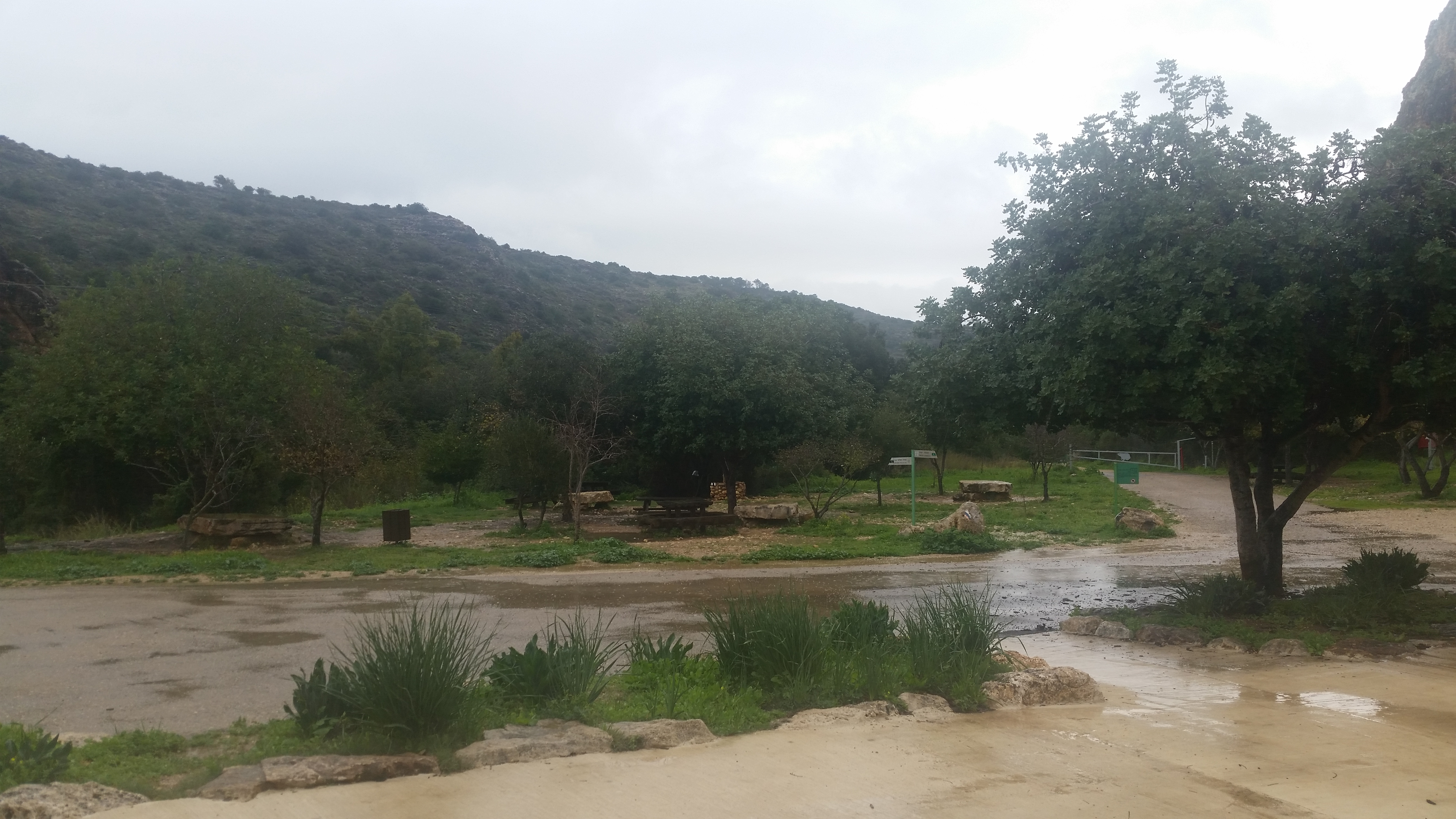 נחל מערות ביום גשום